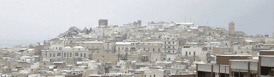 Una delle rare apparizioni della neve a Canosa.